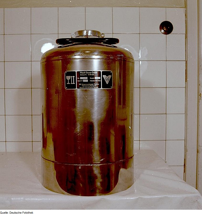 Original image description from the Deutsche Fotothek Gasbehälter